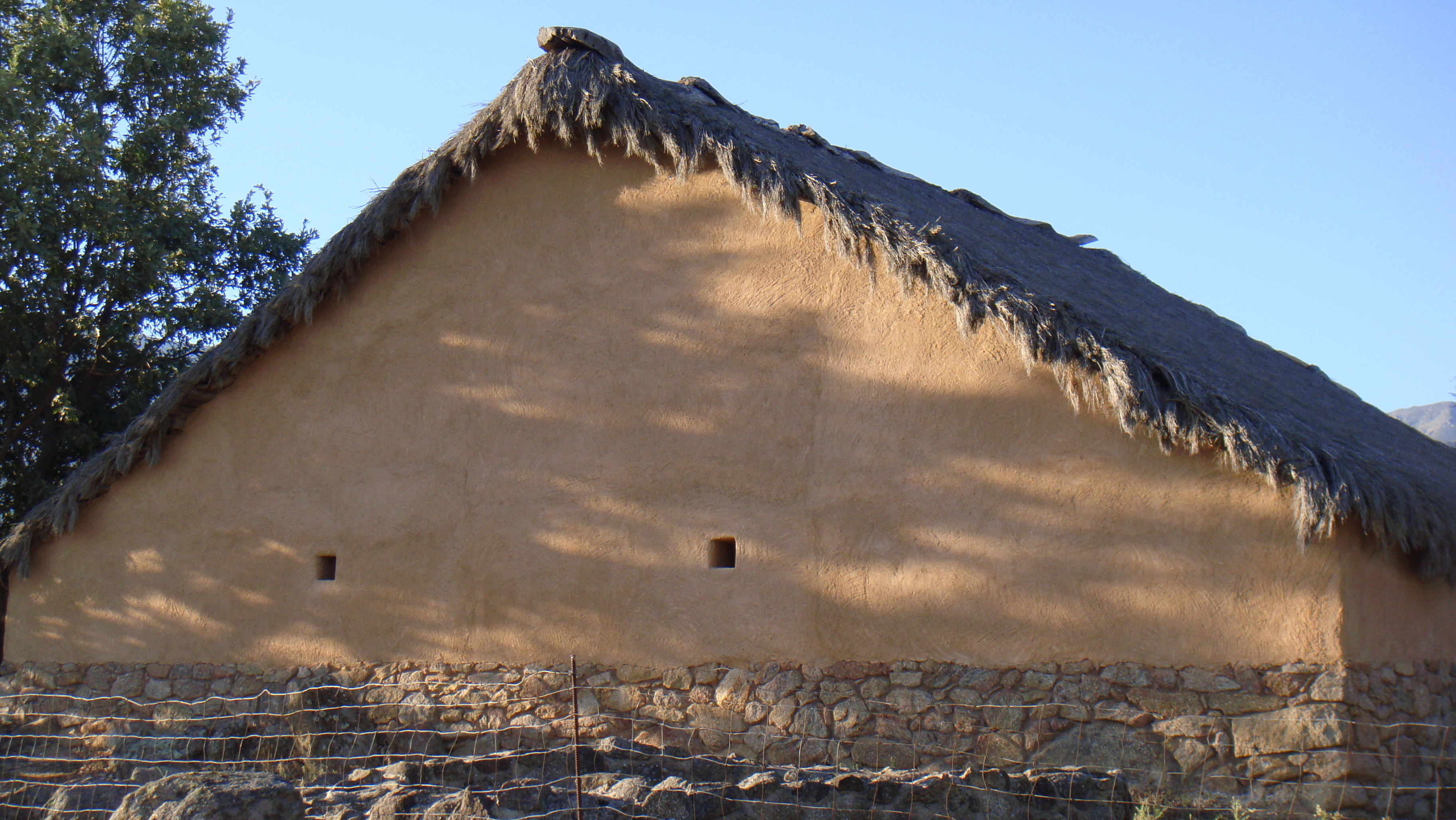 Castro de El Raso (El Reillo), Candeleda, Ávila (España)